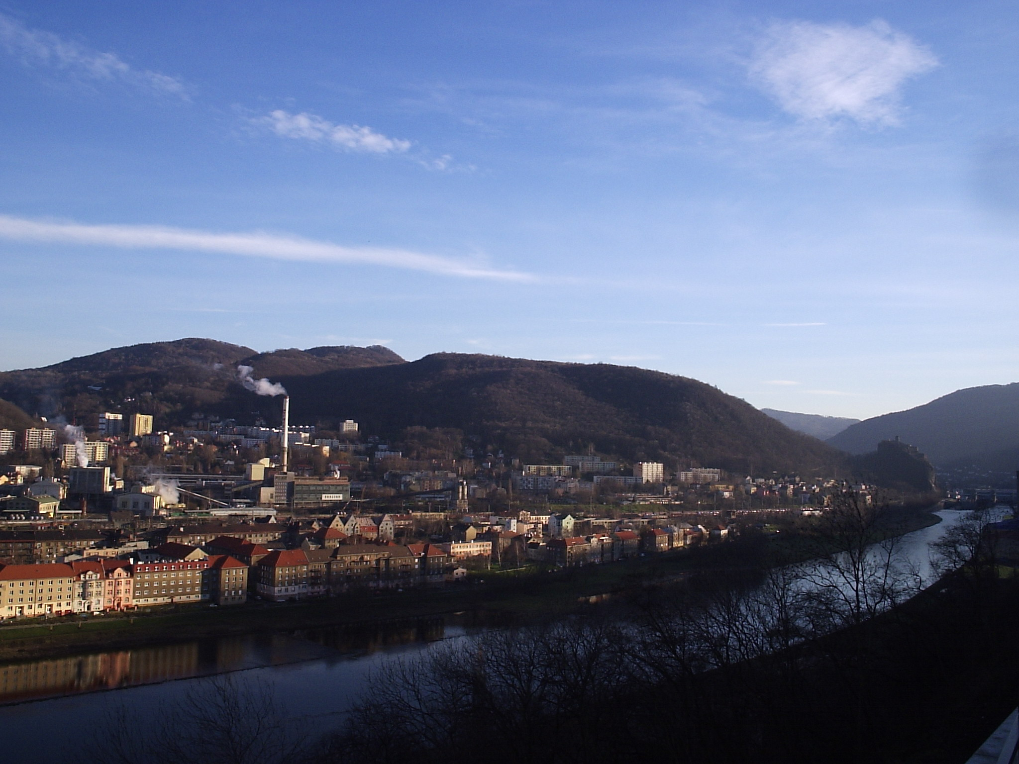 Usti nad Labem Strkov hrad Labe view